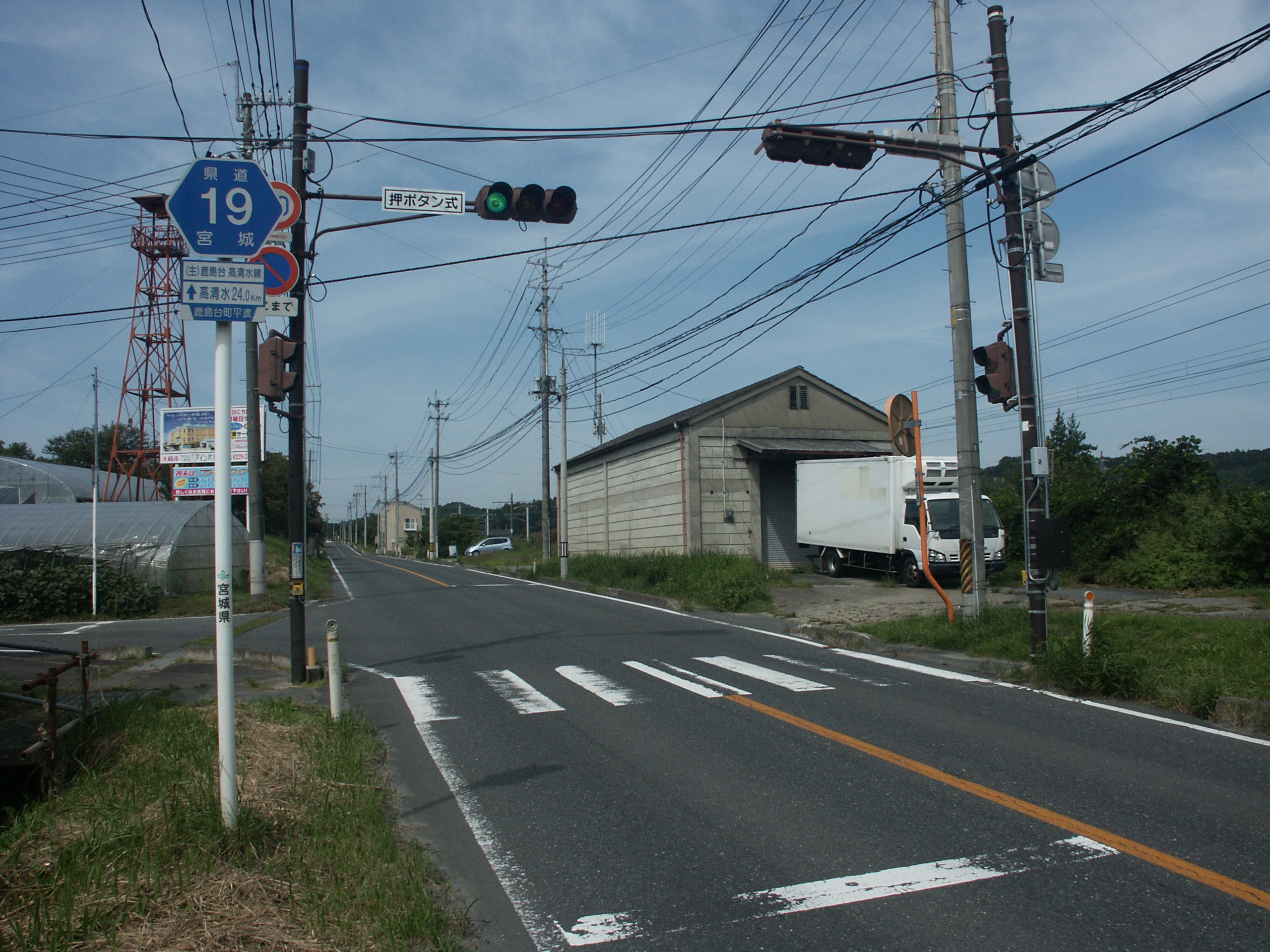 宮城県道19号線大崎市平渡付近